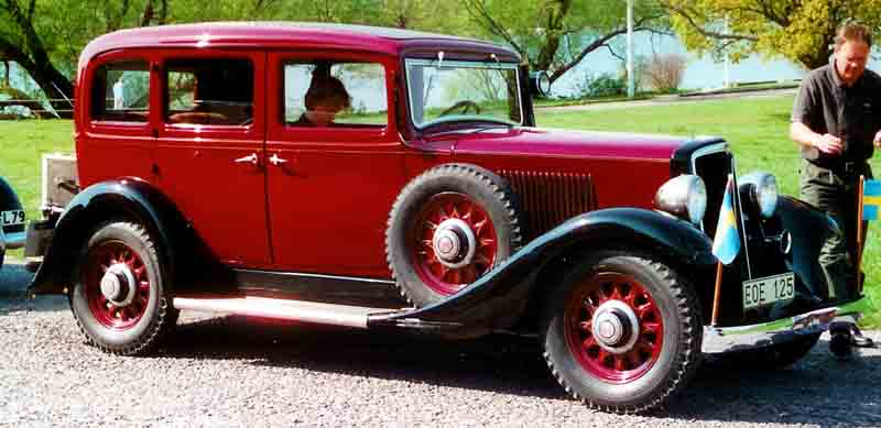 Volvo PV659 4-Door Sedan 1935